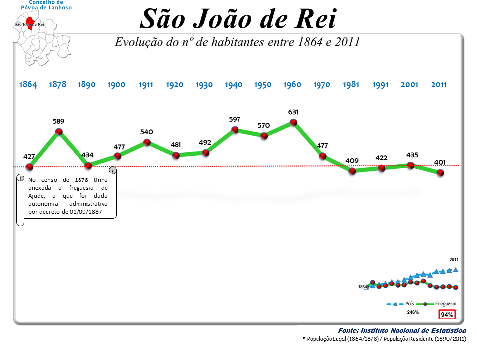 Censos 1864/2011